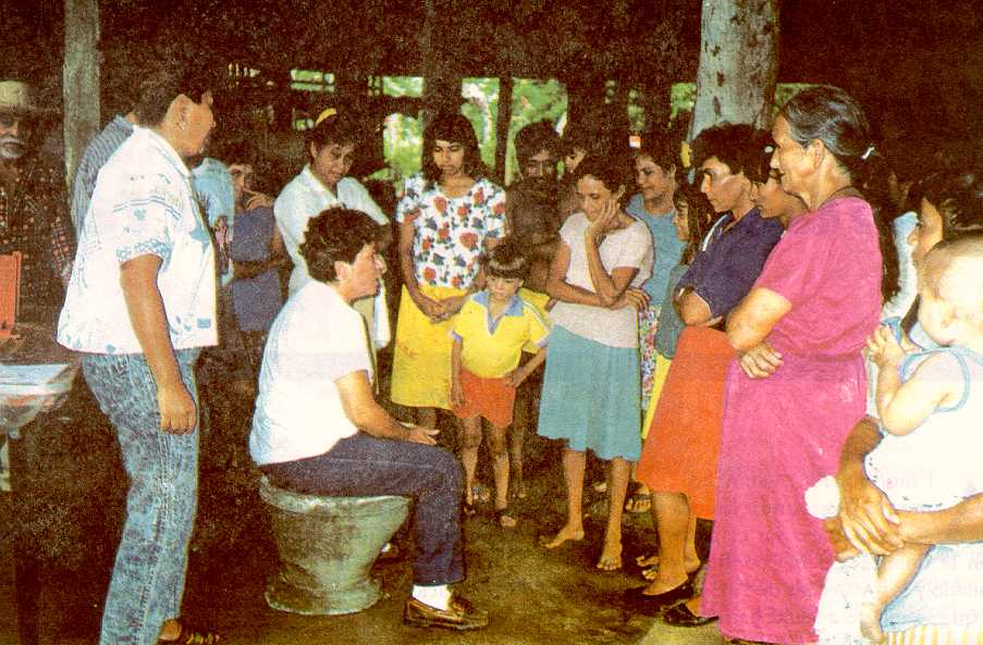 Capacitación para el uso de la letrina abonera. Regón Paracentral de El Salvador. Programa de Higiene Básica y Salud financiado por la Unión Europea. 1994 - 1998 Autor: Alfredo Bianco (Translation by Lawikitejana: Training for the use of latrine. "Regón Paracentral de El Salvador." Health and Basic Hygiene Program financed by the European Union. 1994-1998 Author: Alfredo Bianco.)